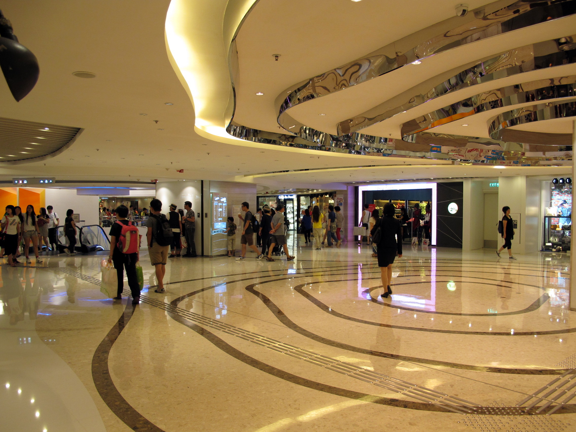 連城廣場 Citylink